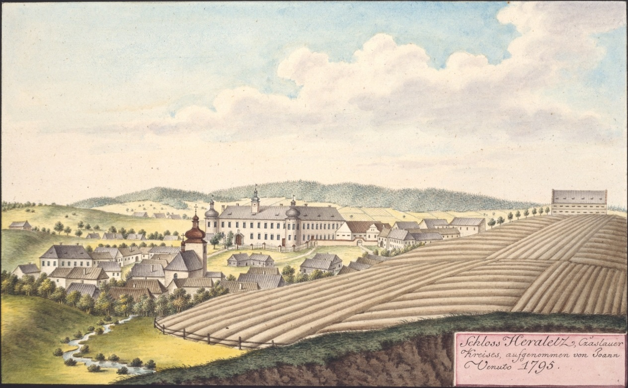 Zámek Herálec Schloss Heraletz, Czaslauer Kreises, aufgenommen von Joann Venuto 1793